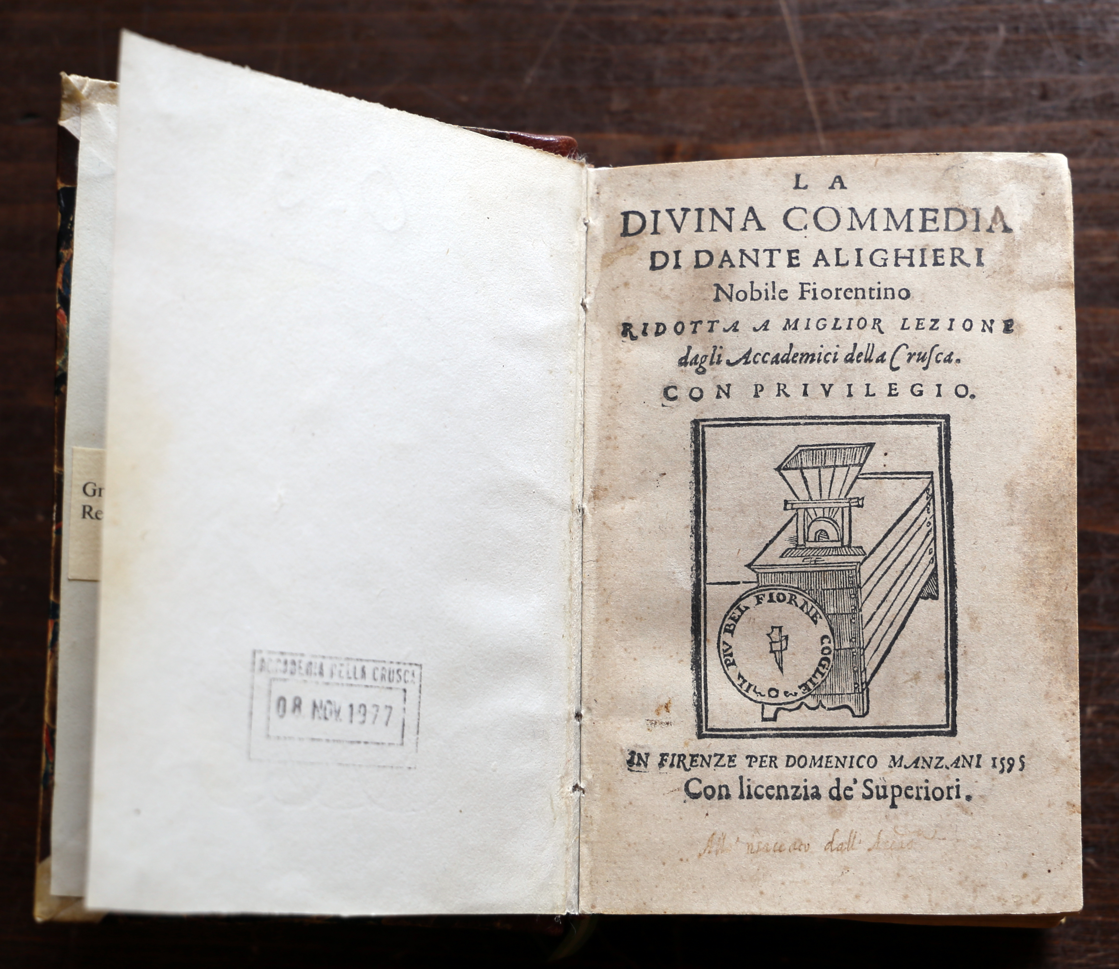 Accademia della Crusca Library La Divina Commedia di Dante Alighieri nobile fiorentino ridotta a miglior lezione dagli Accademici della Crusca Firenze, Domenico Manzani, 1595 Primo esempio dell’altra storica attività secolare dell’Accademia: la preparazione di testi filologicamente attendibili, proprio per servire al Vocabolario. Fin da subito gli Accademici si imbattono nel testo di Dante: non contenti delle versioni circolanti, si mettono al lavoro e, avendo come testo di riferimento l’edizione curata dal Bembo del 1502, confrontano un centinaio di codici (sembra che il solo Bastiano de Rossi ne studiasse una trentina). Nell’introduzione scritta da Bastiano de Rossi si accenna ai lavori per il vocabolario già in corso (uscirà poi nel 1612) Non c’è commento ma solo il testo. Come capilettera sono riprodotte le imprese accademiche In fondo al volume c’è un esempio di “contaminatio”: un gatto (simbolo del tipografo Manzani) che aziona il frullone (simbolo dell’Accademia), a significare che solo con il lavoro editoriale si hanno risultati del lavoro di scelta e spoglio della lingua…